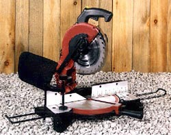 Miter Saw